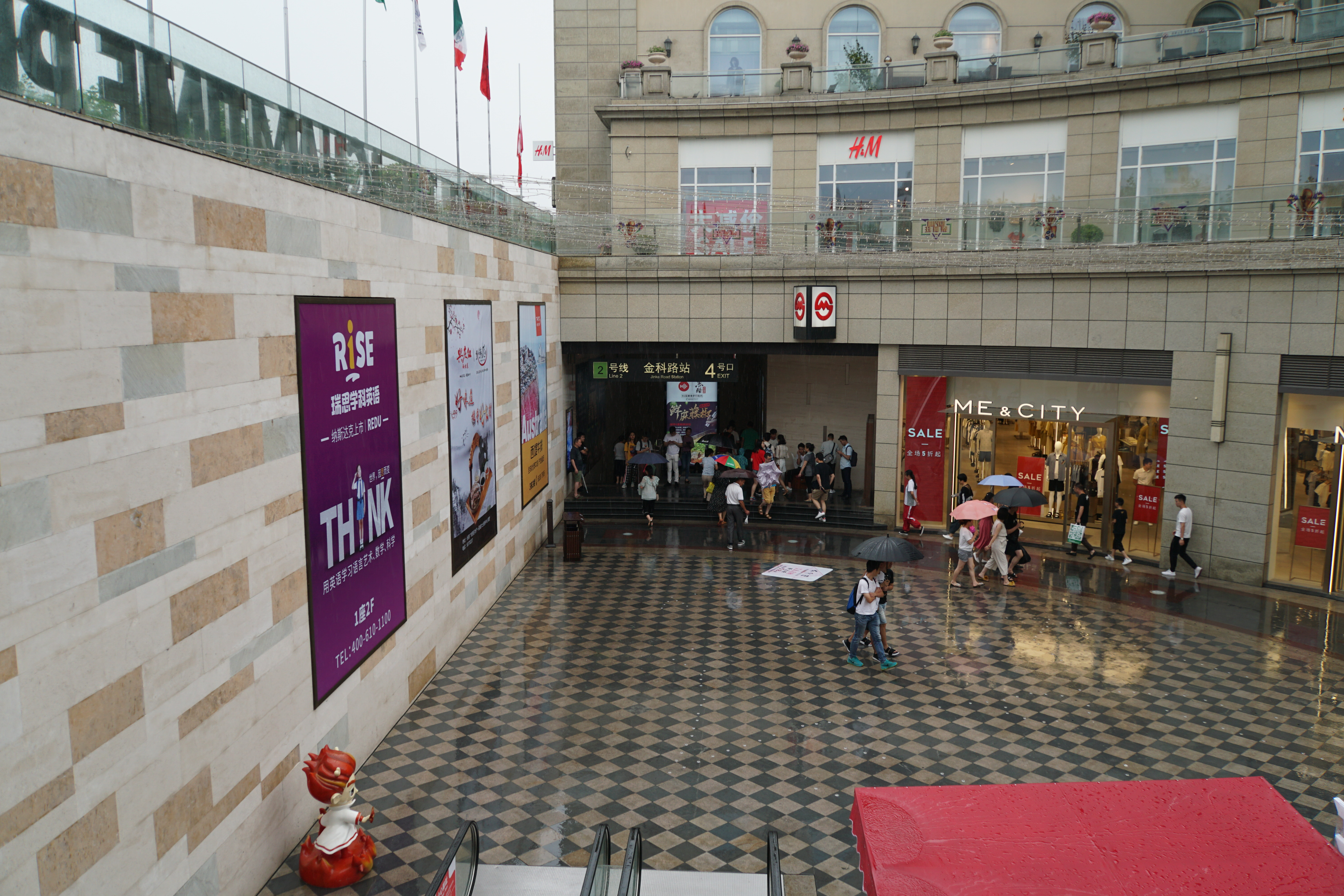 金科路站4号口